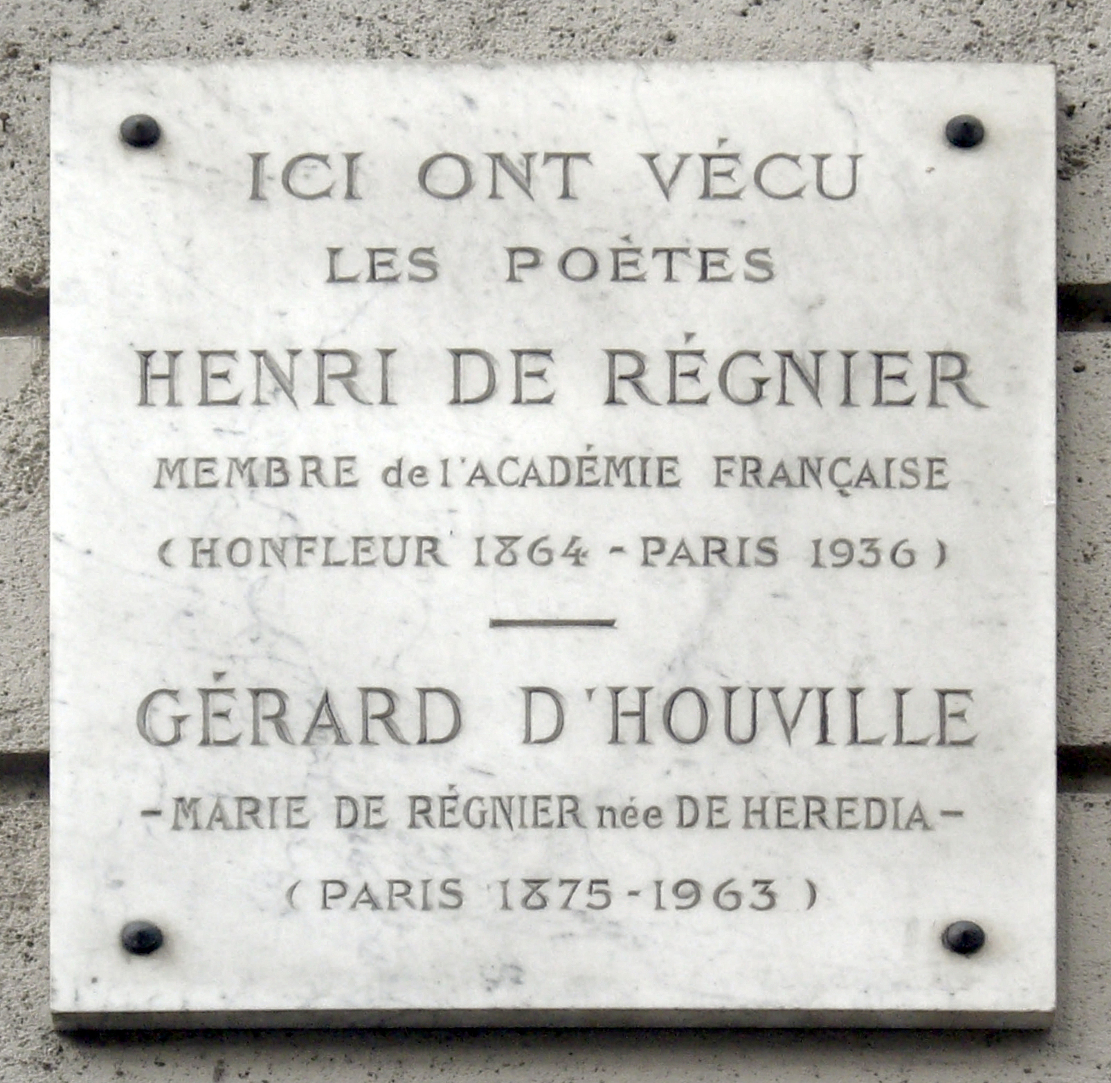 Plaque apposée au n° 24 de la rue Boissière, Paris 16e, où vécurent les poètes Henri de Régnier (1864-1936) et Marie de Heredia (1875-1963), née Marie de Régnier et dite Gérard d'Houville.